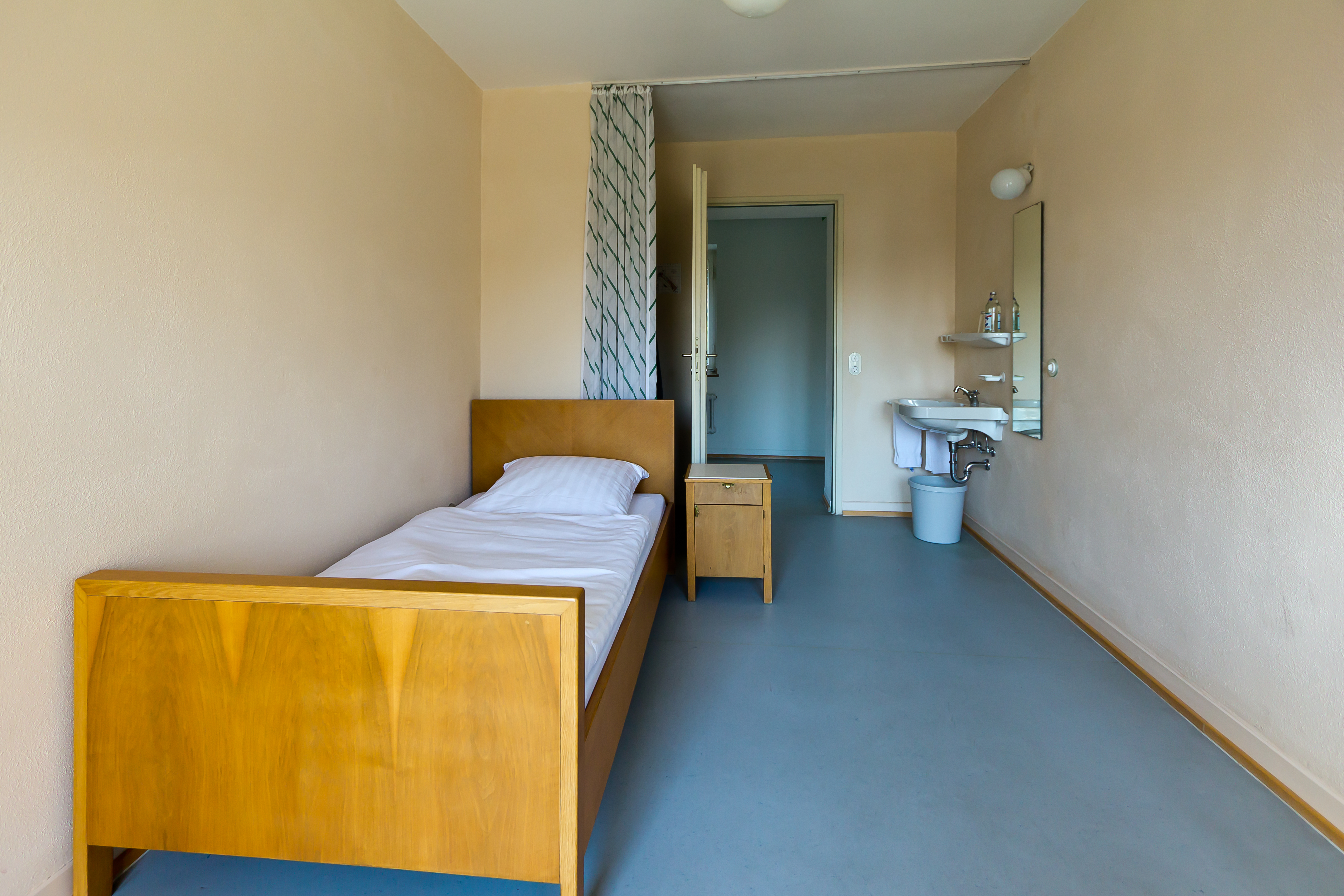 Das Haus auf der Alb, denkmalgeschützt, Original Zimmereinrichtung aus den 1930er Jahren, Bad Urach im Herbst 2011